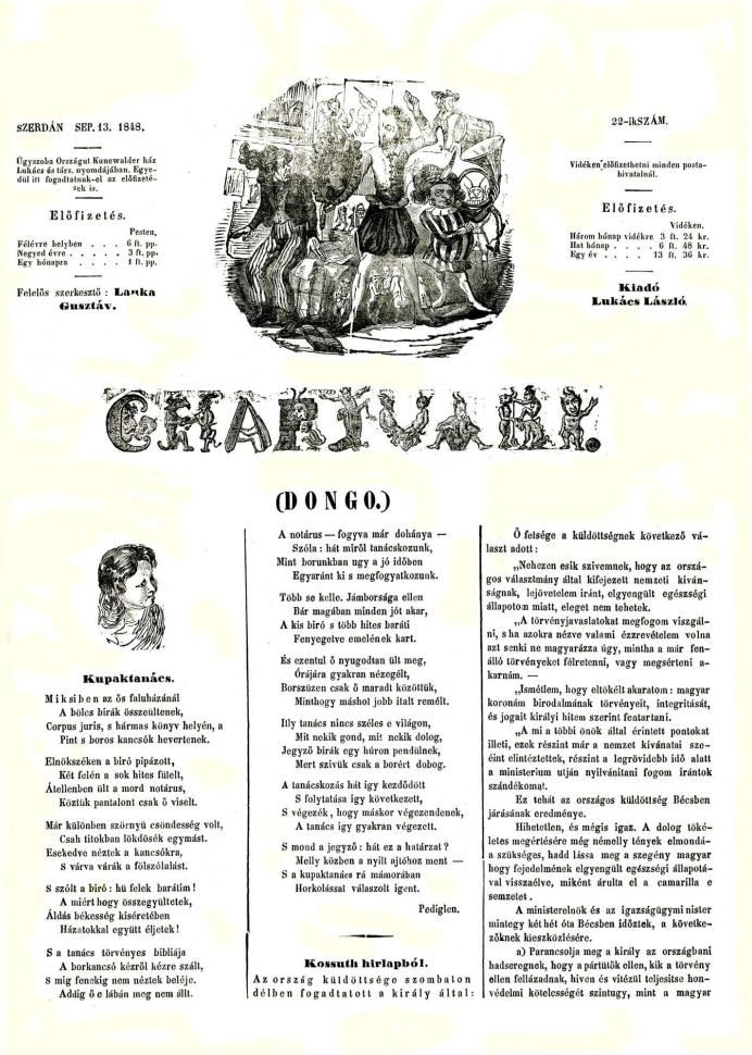 Az első magyar nyelvű élclap, a Charivari dongó című kiadvány 22. számának első oldala (1848/49-es forradalom és szabadságharc; humor; karikatúra; magyar történelem; politika) A magyar sajtótörténet az önálló lapként kiadott pesti Charivaritól számítja az első rendszeresen megjelenő magyar élclap, a pesti vicc születését. Szerkesztője Lauka Gusztáv pesti humorista volt, aki Petőfi baráti köréhez tartozott. A katonatiszt és feltaláló Szerelmey Miklóssal fogott össze 1848 júniusában az első élclap elindításáért, melyből mindössze 25 szám jelent meg, majd az alkotók beálltak a honvédseregbe.